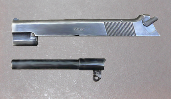 MAC 35 S